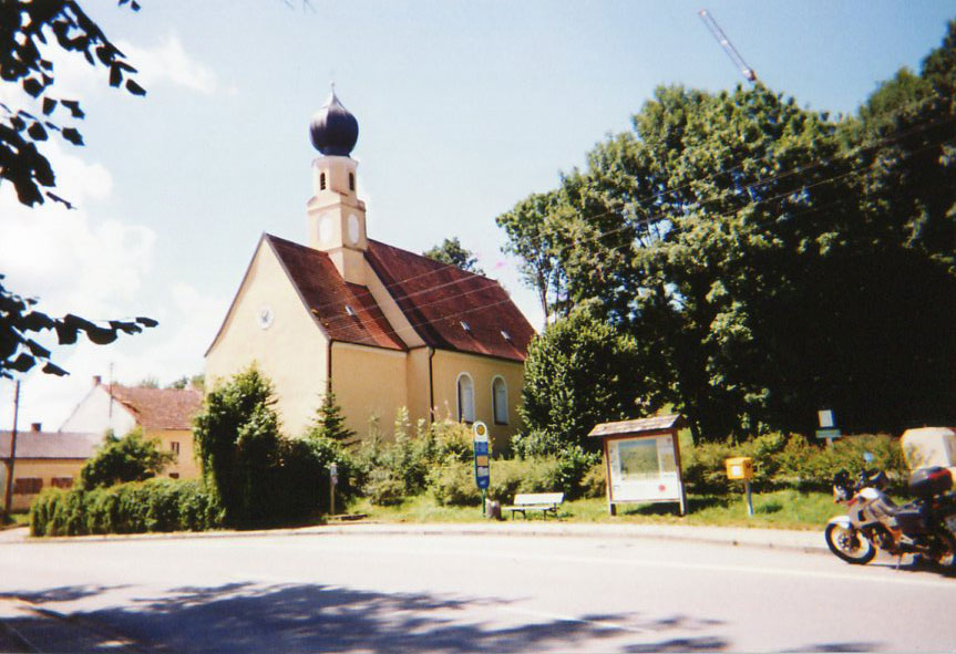 Die Kirche Armstorf von Nordosten